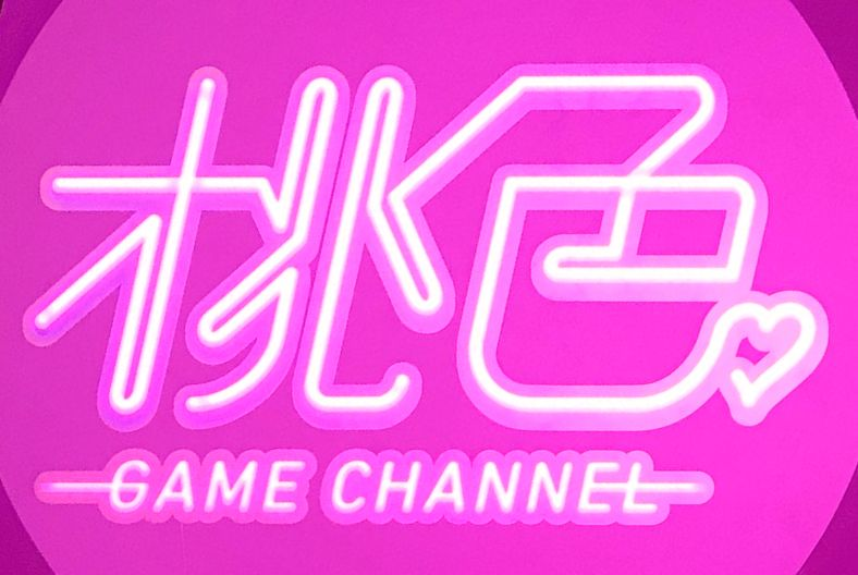 桃色ゲームチャンネル 番組ロゴ